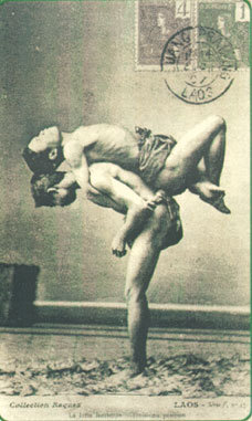 Lao boxing